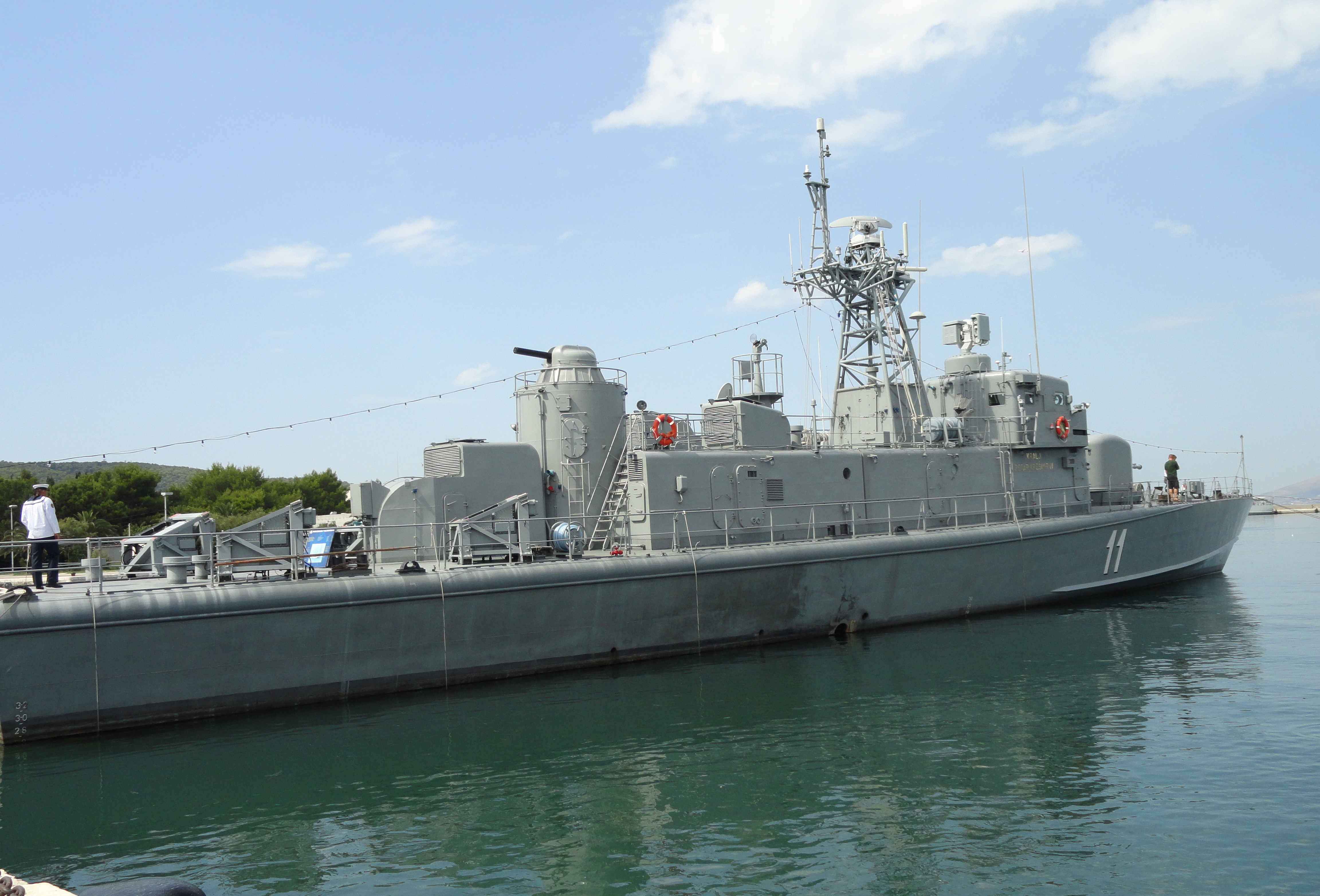 RTOP-11 Kralj Petar Krešimir IV. u Lori.